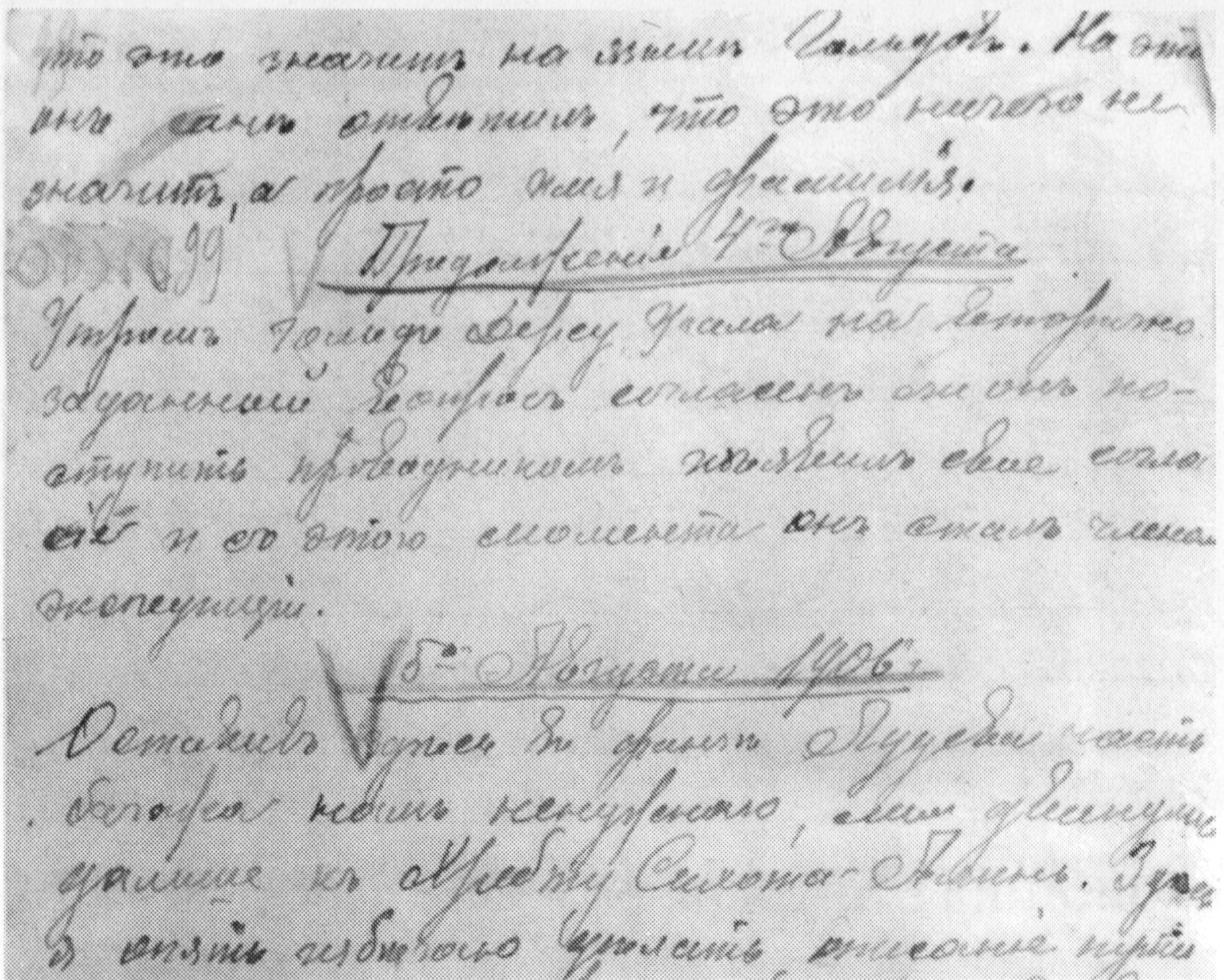 страница путевого дневника Владимира Клавдиевича Арсеньева от 4 (17) августа 1906 г. с записью о согласии Дерсу Узала стать проводником: Текст в дореволюционной орфографии: «Продолженіе 4го Августа Утромъ гольдъ Дерсу Узала на повторно заданный вопросъ согласенъ ли онъ поступить проводникомъ изъявилъ свое согласіе и съ этого момента онъ сталъ членом экспедиціи.» В современной орфографии: «Продолжение 4го августа Утром гольд Дерсу Узала на повторно заданный вопрос согласен ли он поступить проводником изъявил свое согласие и с этого момента он стал членом экспедиции.»